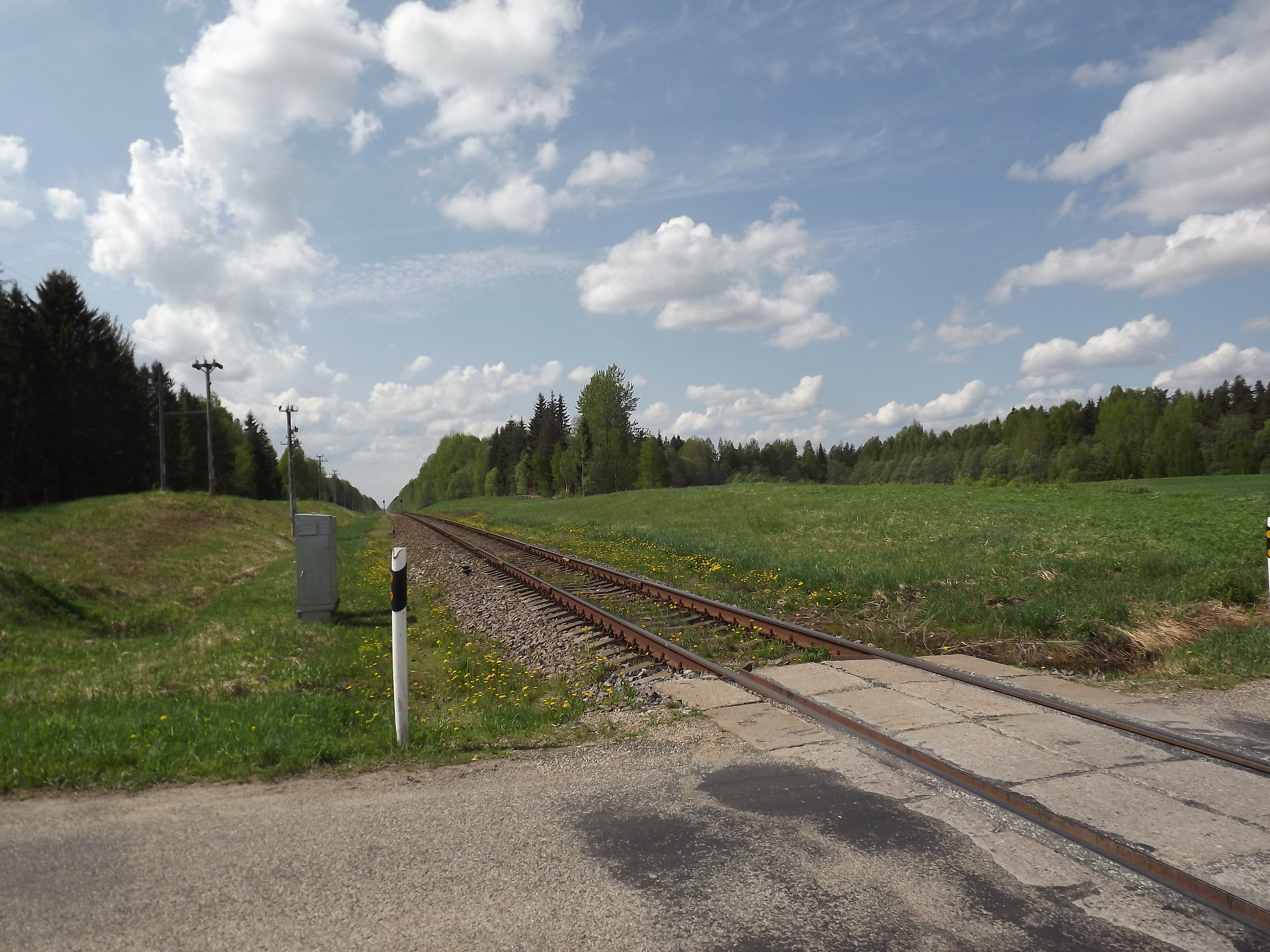 Endine Ratsimäe raudteepeatus